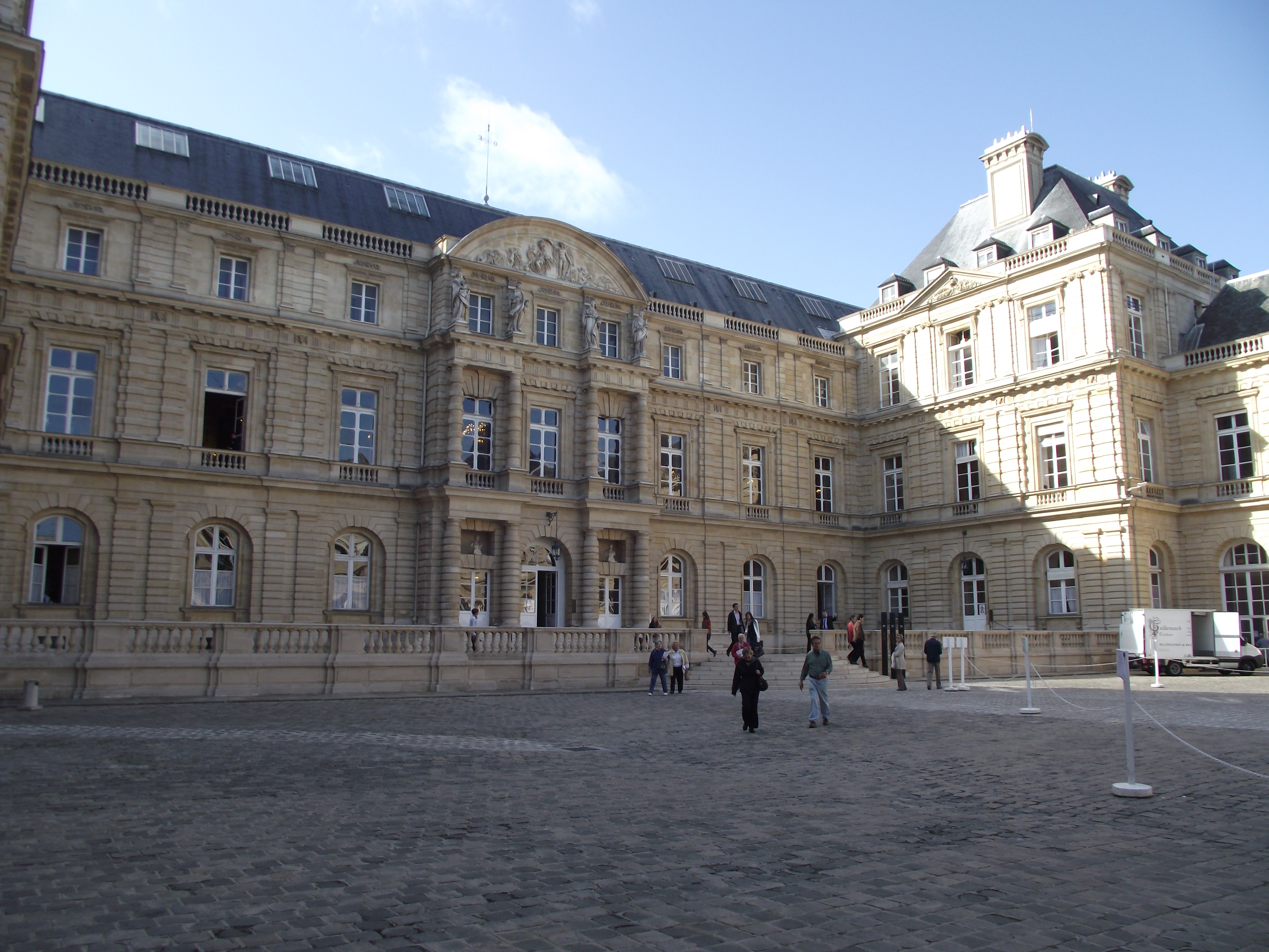 Paris, palais du Luxembourg, La court d'honneur